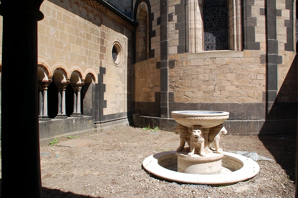 Maria Laach, Eifel, Germany